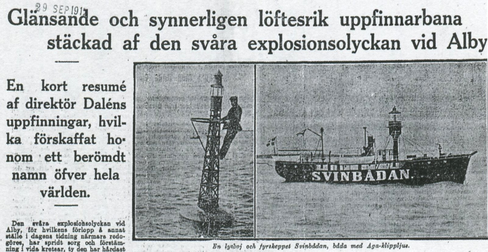 Tidningsklipp då Gustaf Dalén miste synen när han experimenterade med acetylengas på Alby gård.